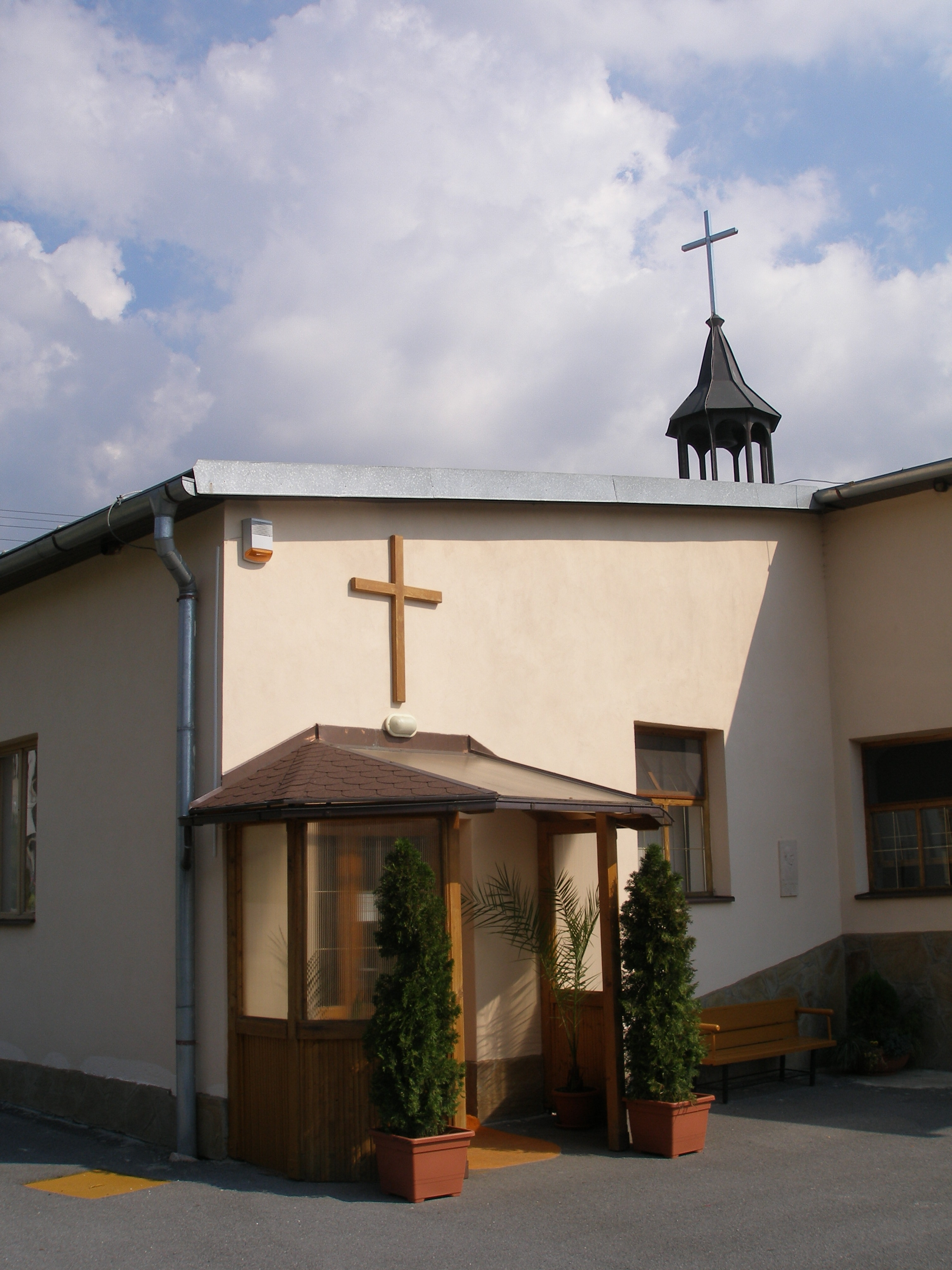 Šarišská obec Kojatice časť Šarišské Lužianky